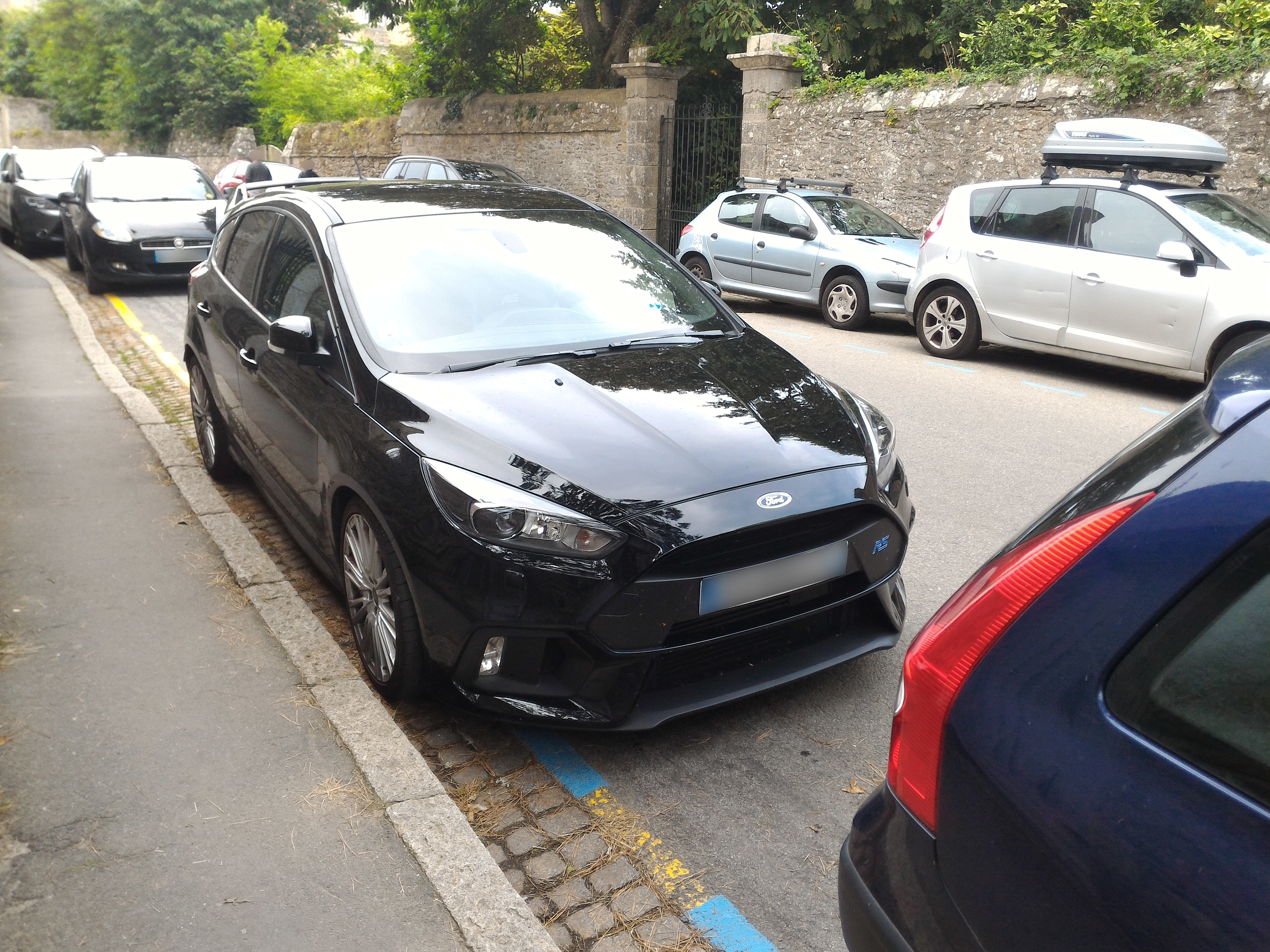 Ford Focus RS (3 ème génération)